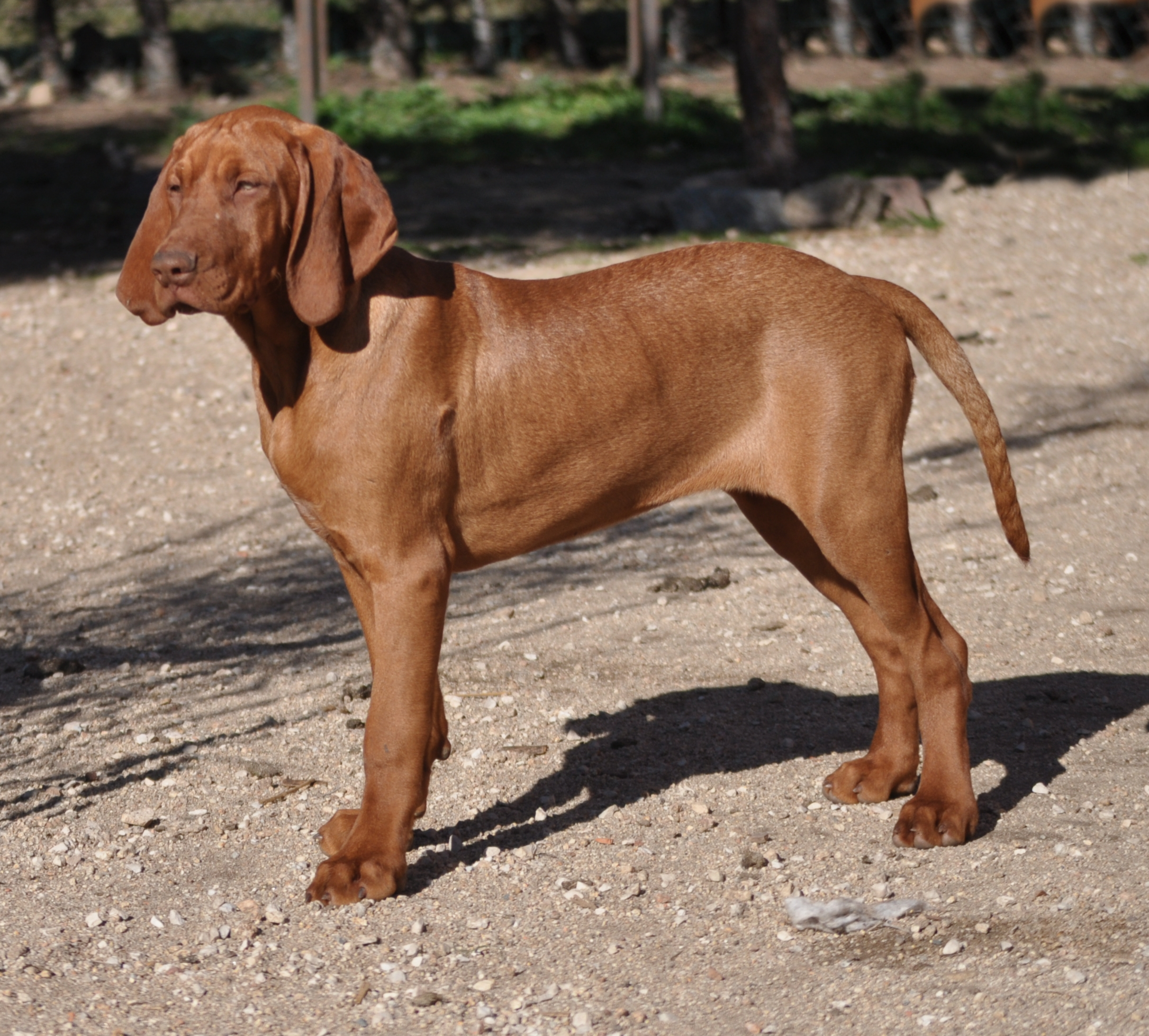 cachorrita de 4 meses de vizsla